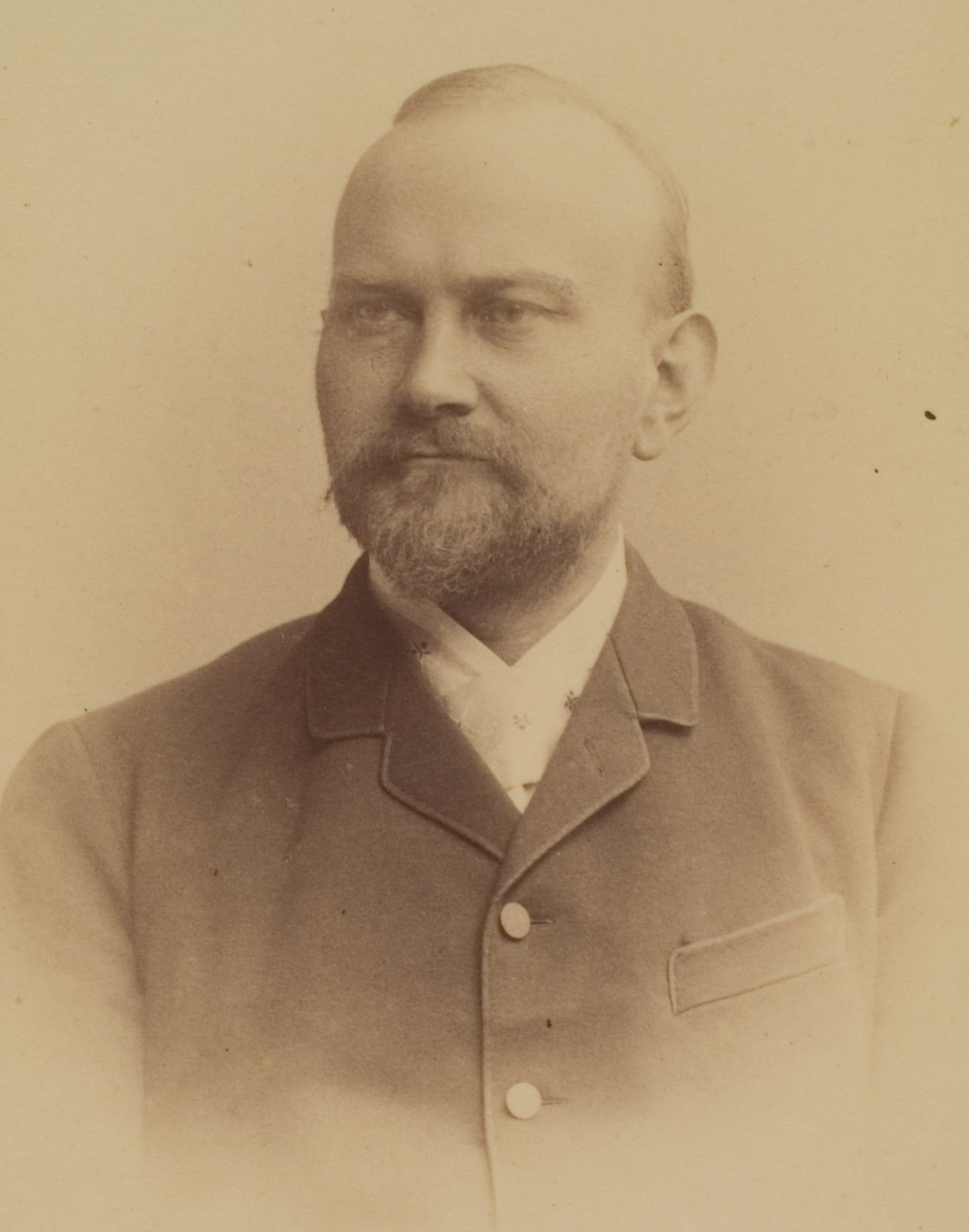 Fritz Neumann, Romanist, 1890–1923 Professor in Heidelberg